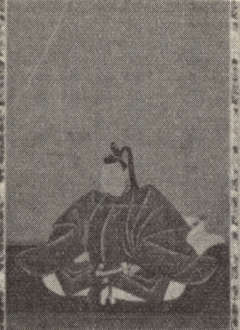 遠藤常友の肖像(モノクロ)。